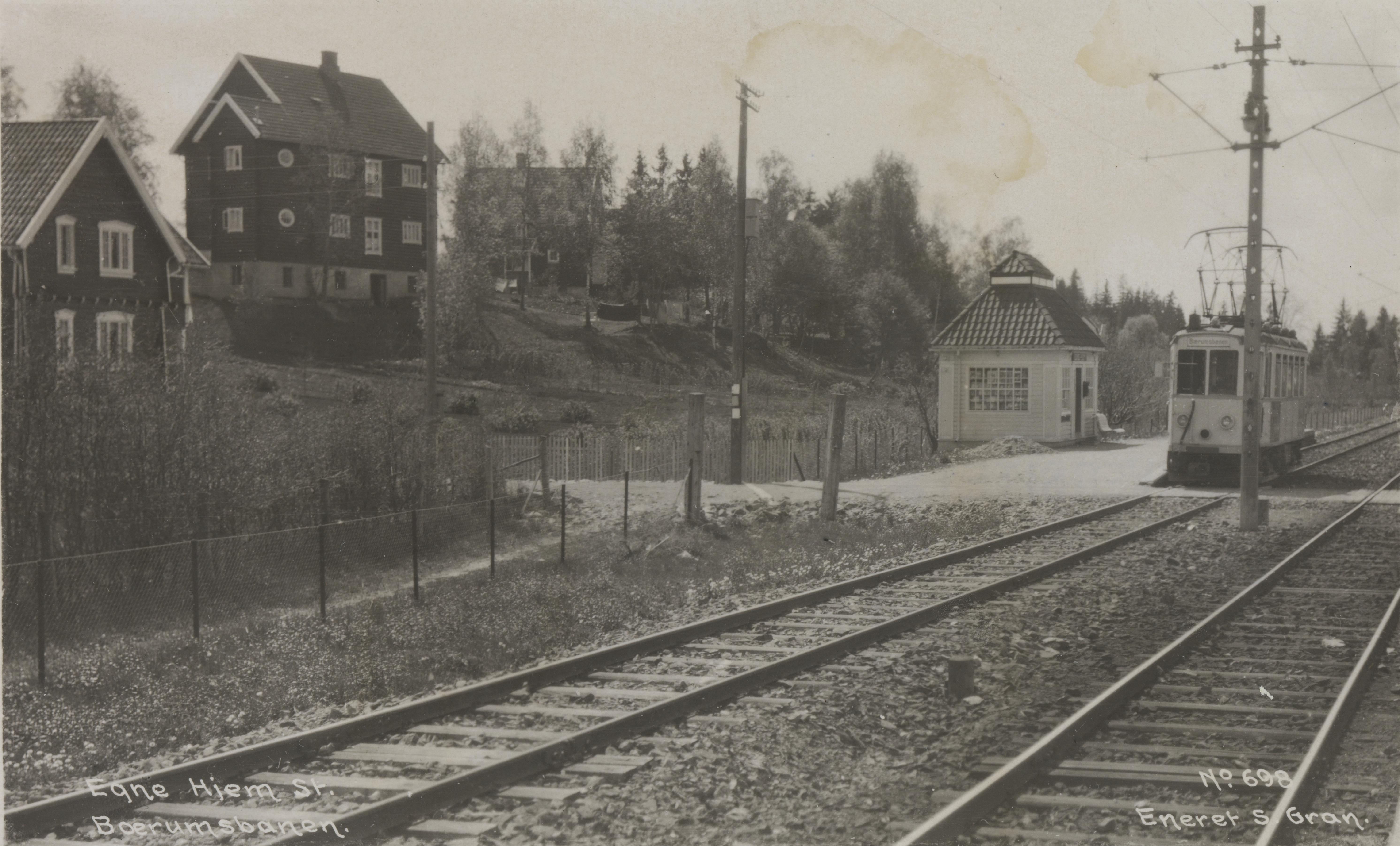 Bildet er hentet fra Nasjonalbibliotekets bildesamling Bærum,Egne Hjem,Egne Hjem stasjon, Bærum, Akershus